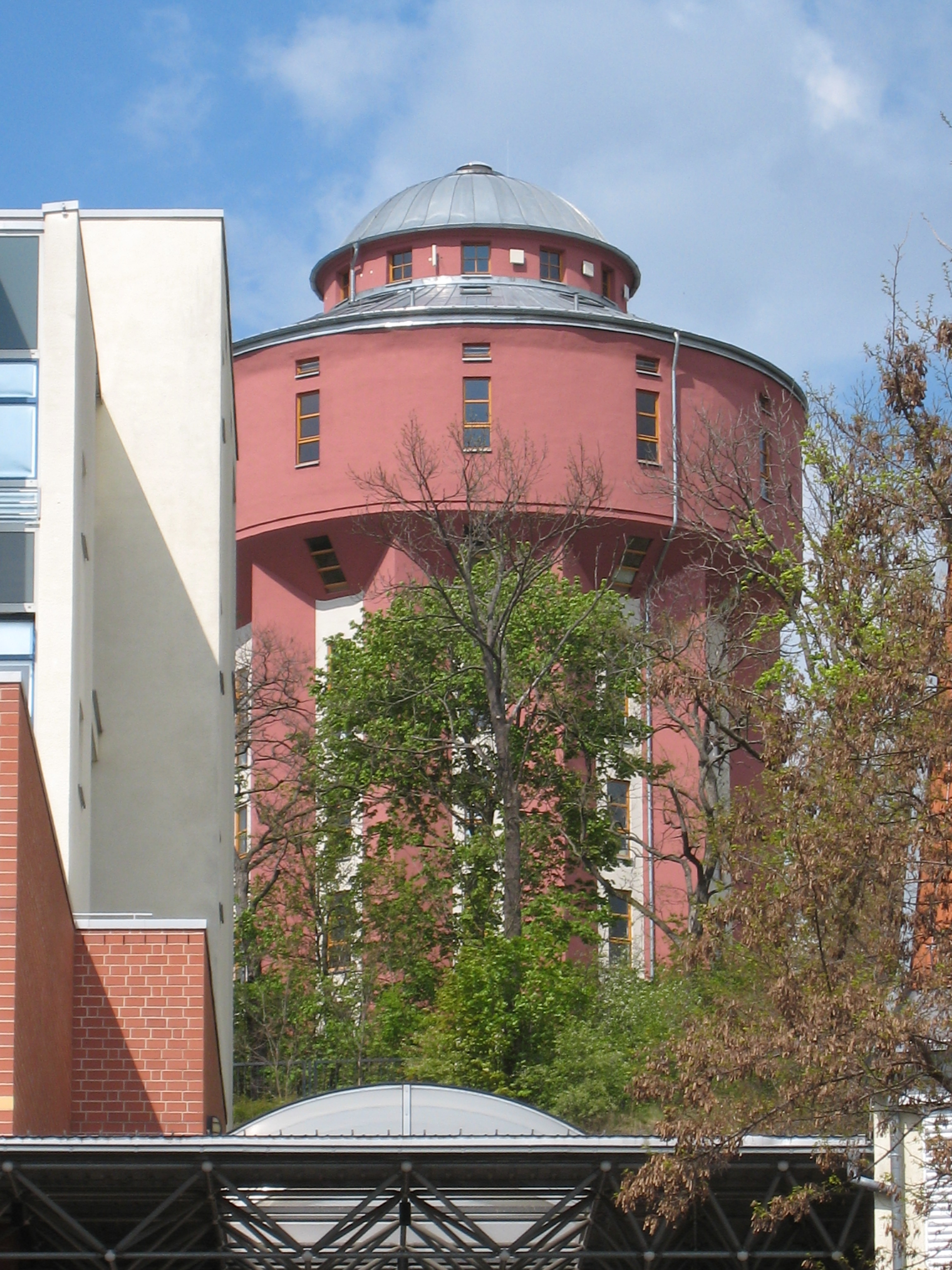 Wasserturm in Arnstadt